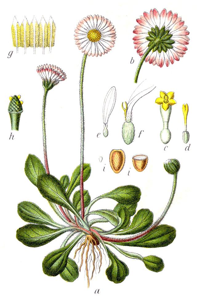 Bellis perennis L. Original Caption Gemeines Massliebchen, Bellis perennis